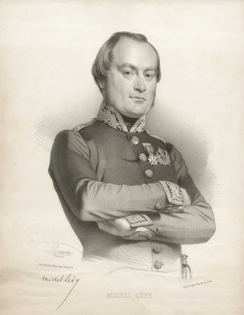 zeitgenössisches Portrait Michel Lévy, Lithographie